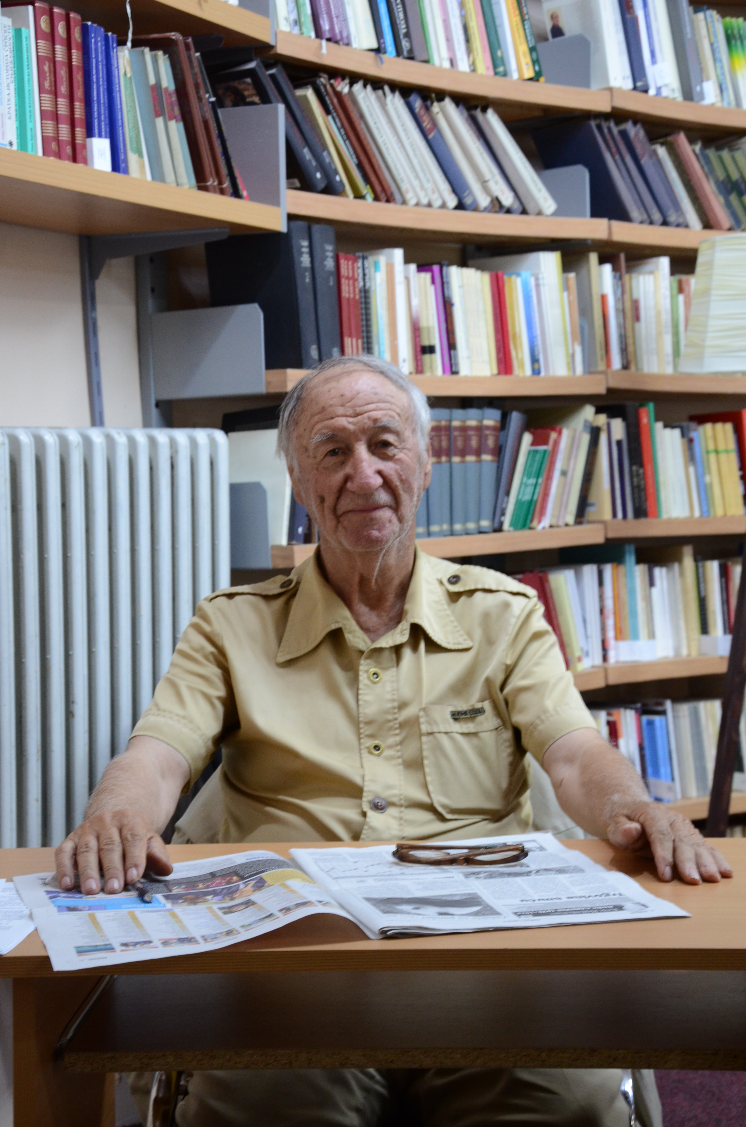 Dragoslav Manić Forski u Narodnoj biblioteci Pirot